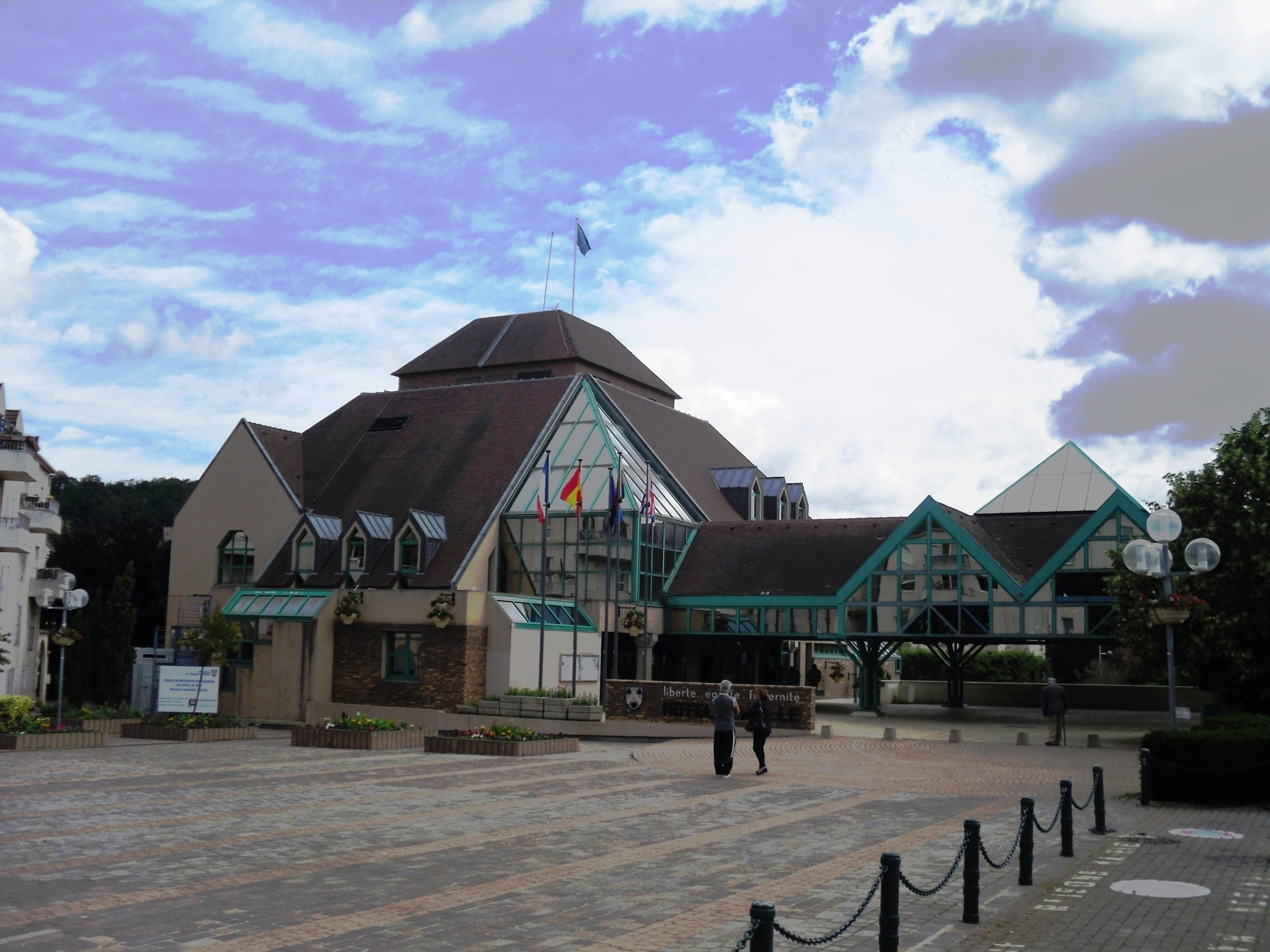 HoteldeVilleVillebon-sur-Yvette.jpg